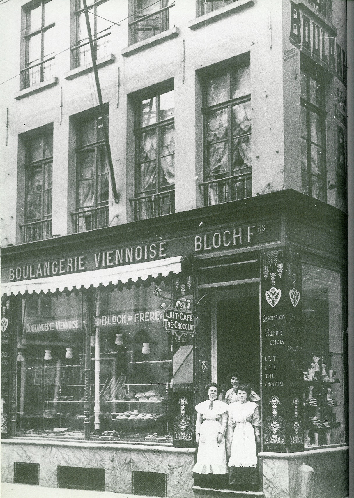 Gent (Belgium) - Patisserie Bloch 1898-2008